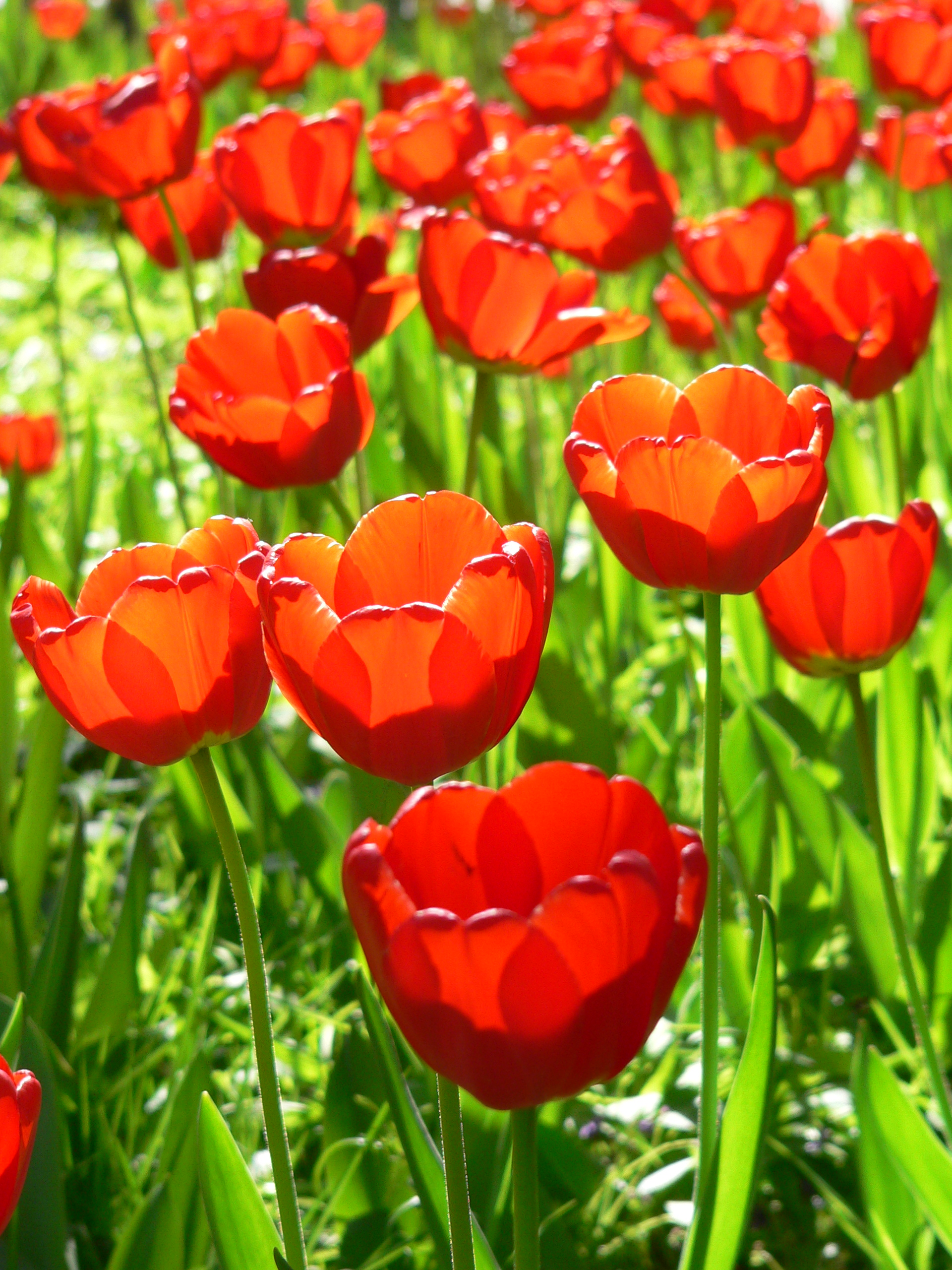 红色郁金香